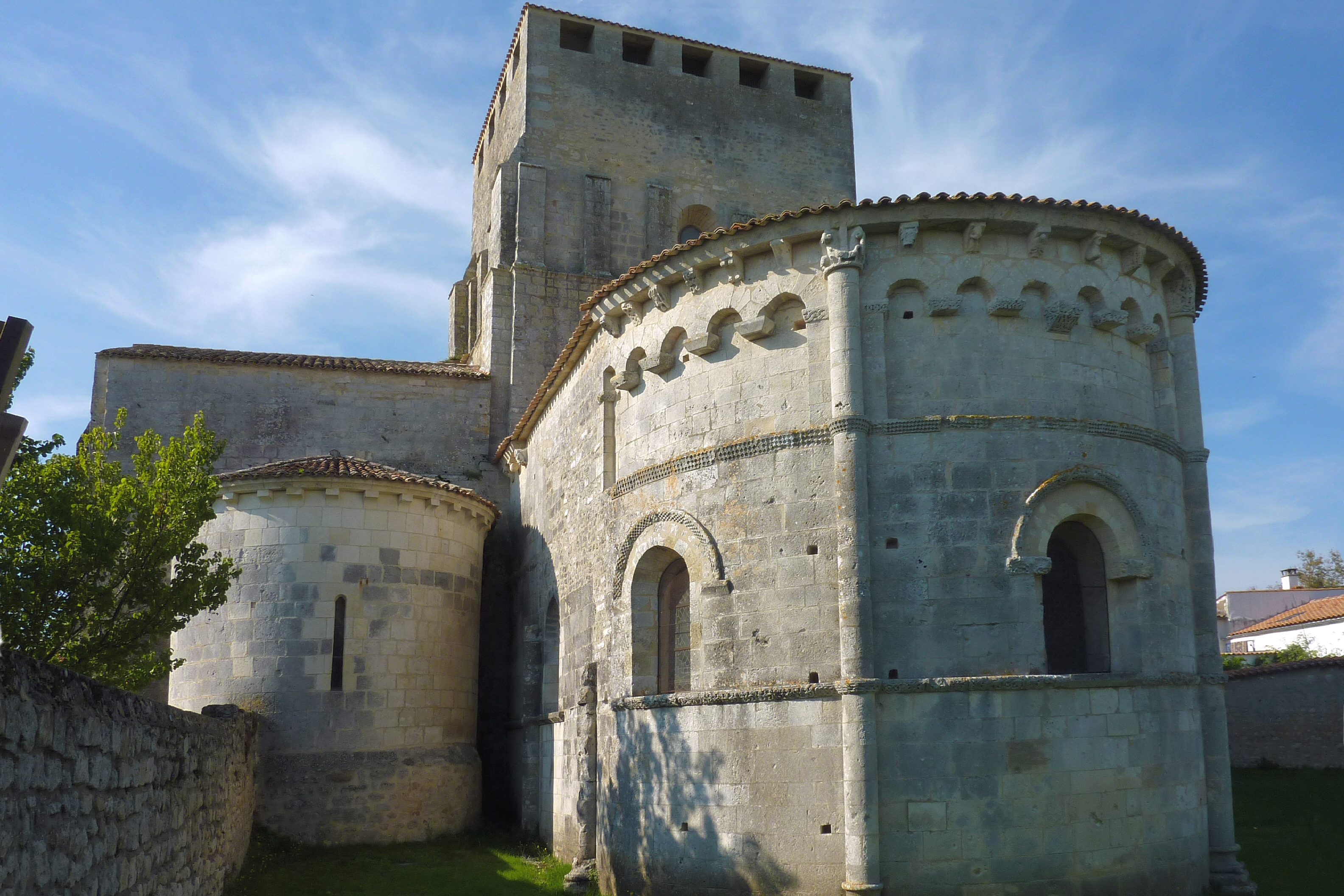 Vue Arrière de l'église Saint-Pierre Mornac-sur-Seudre Charente-Maritime France .